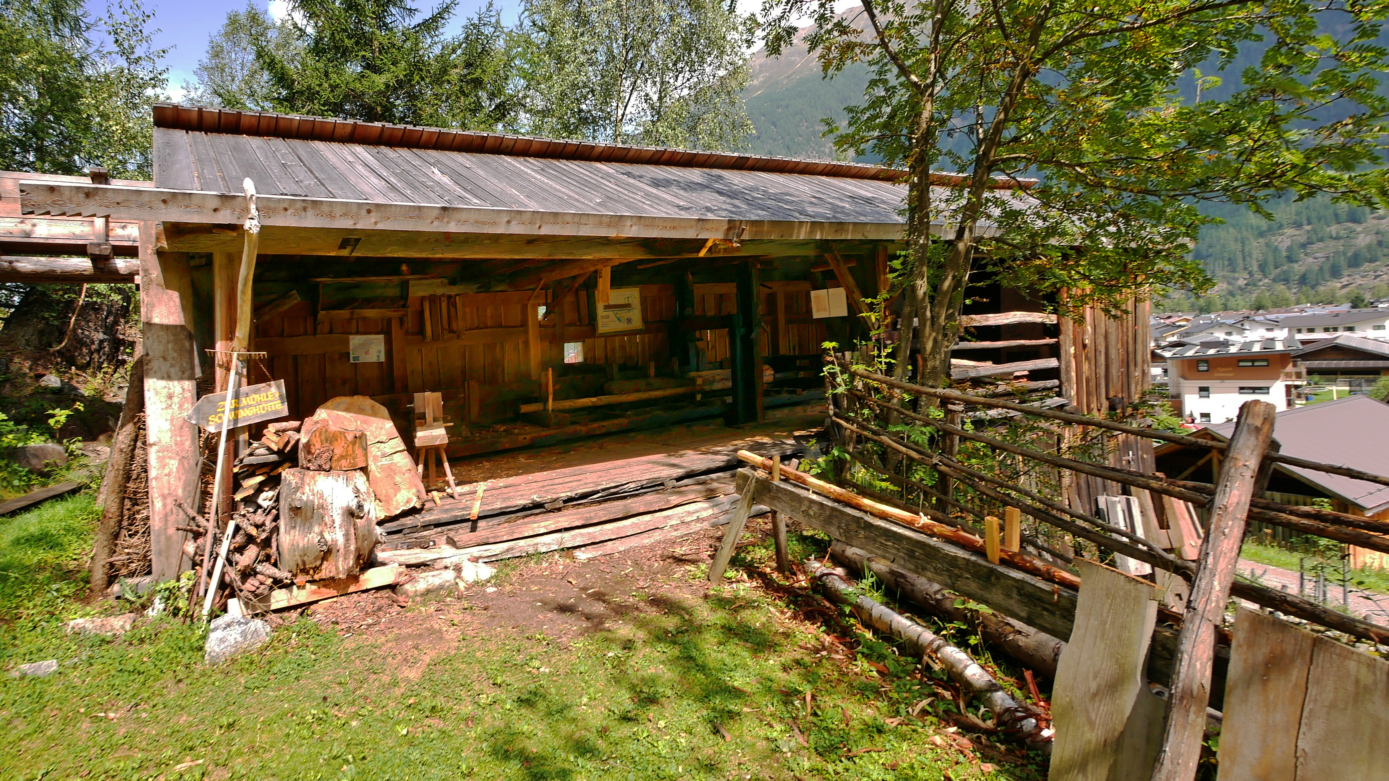 Ötztaler Freilichtmuseum, Längenfeld Ötztal/Tirol - Wassergetriebene Sägemühle